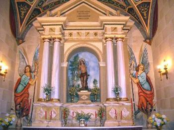 Imagen de San Sebastián.